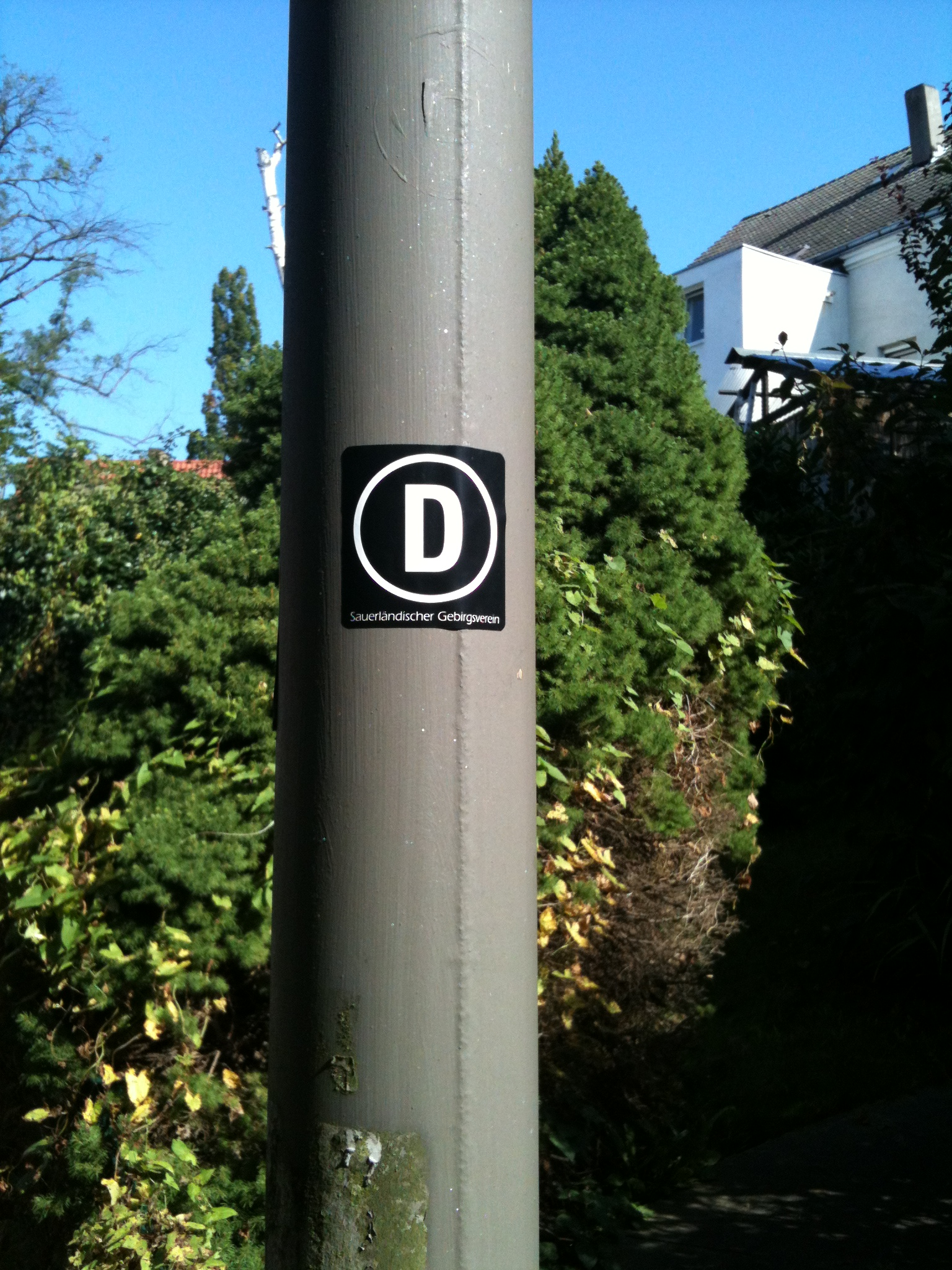 Zeichen des Rundwanderweges Dortmund